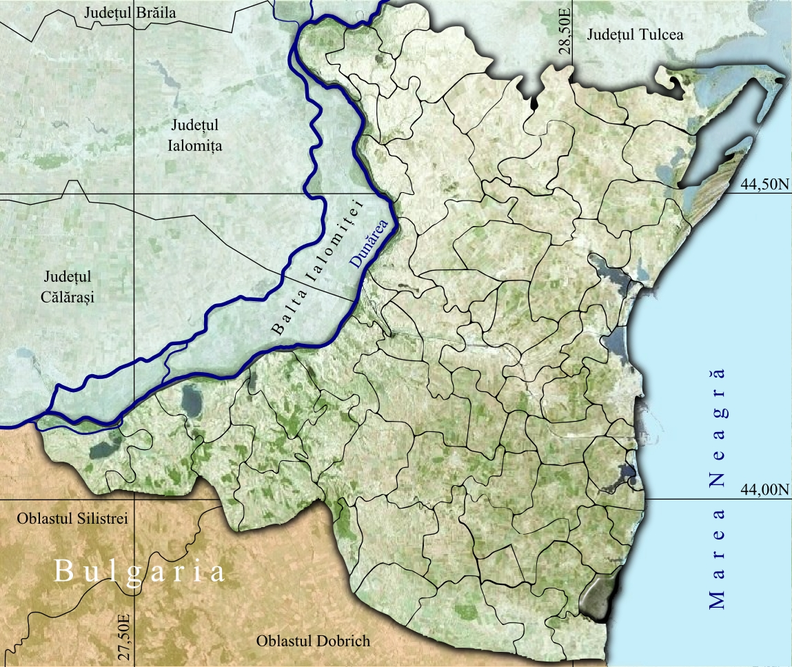 Mangalia jud Constanta.jpg